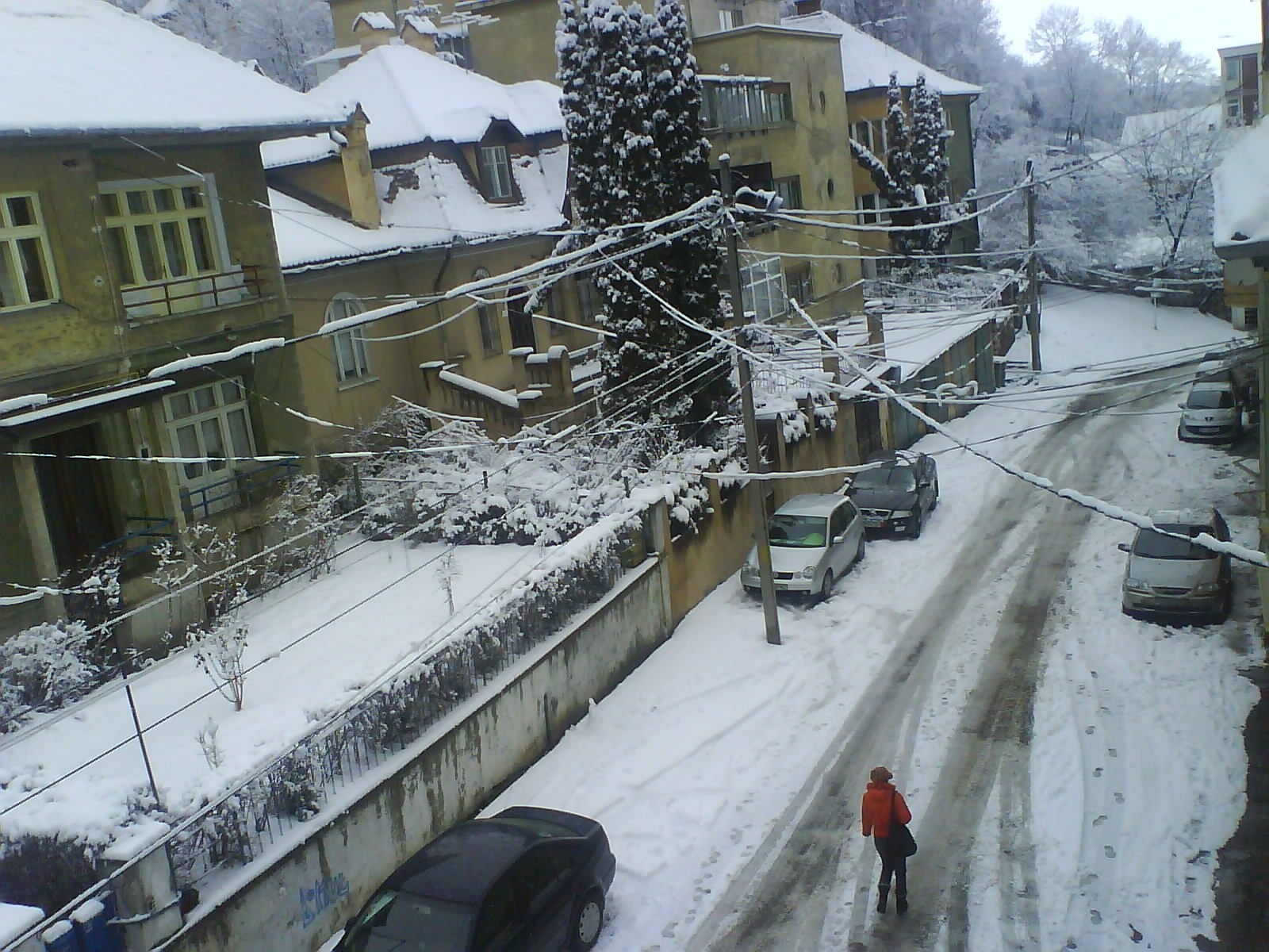 Street in Brasov in winter